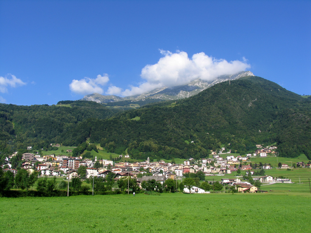 Pasturo 08/2008